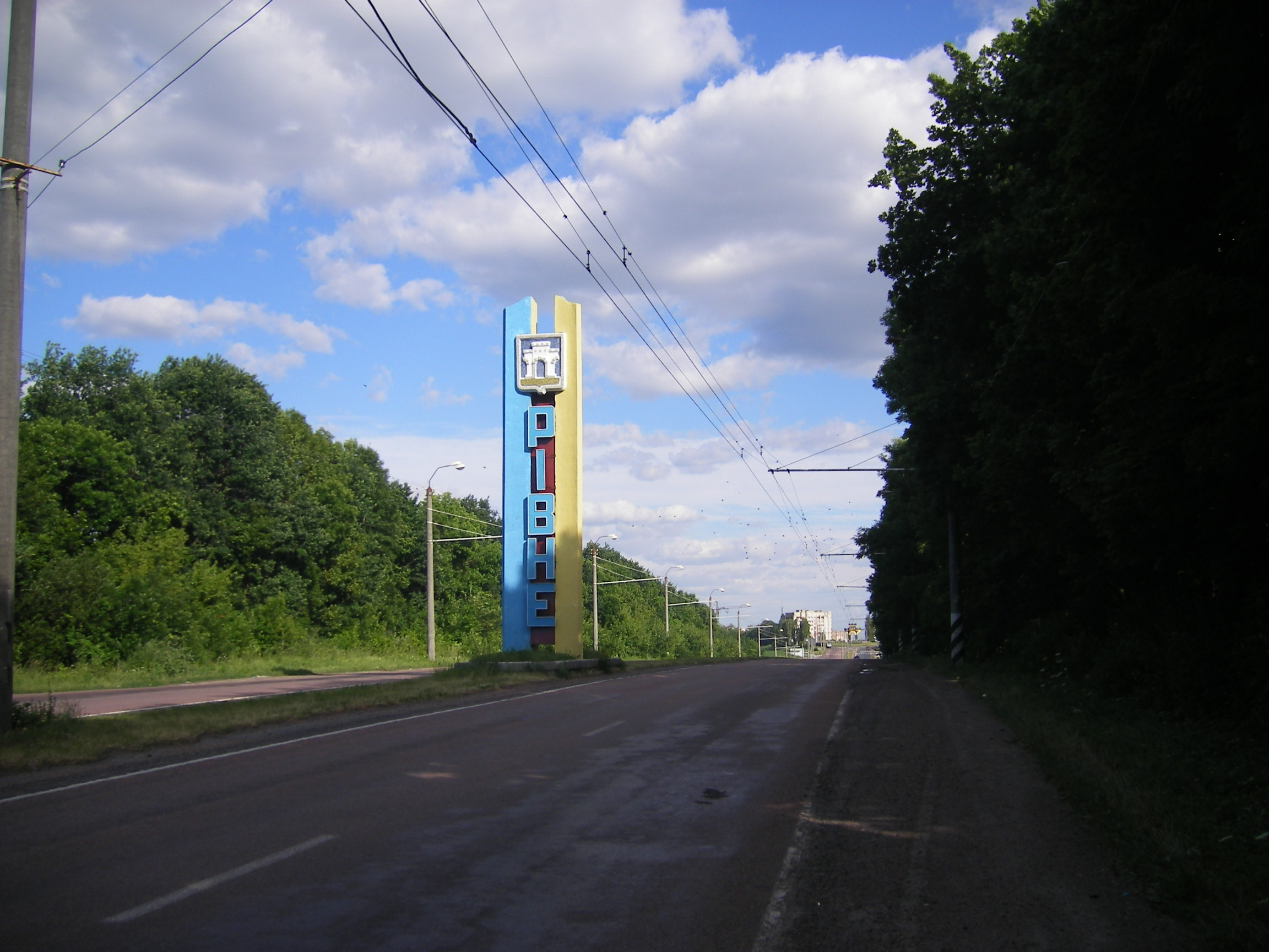 Rivne